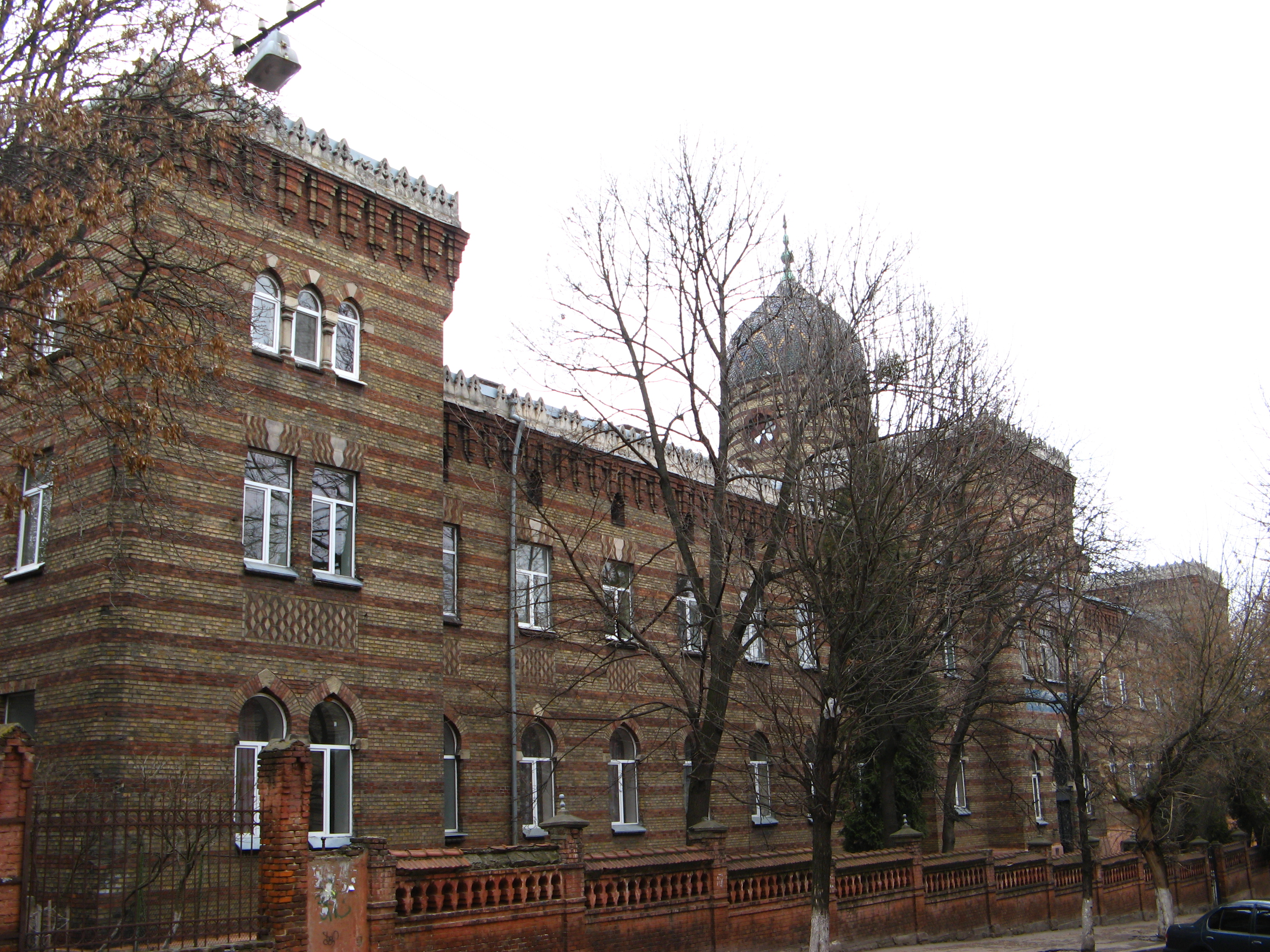 Львів, вул. Раппопорта, 8. Колишній єврейський шпиталь. Арх. Казимир Мокловський (1869—1905)